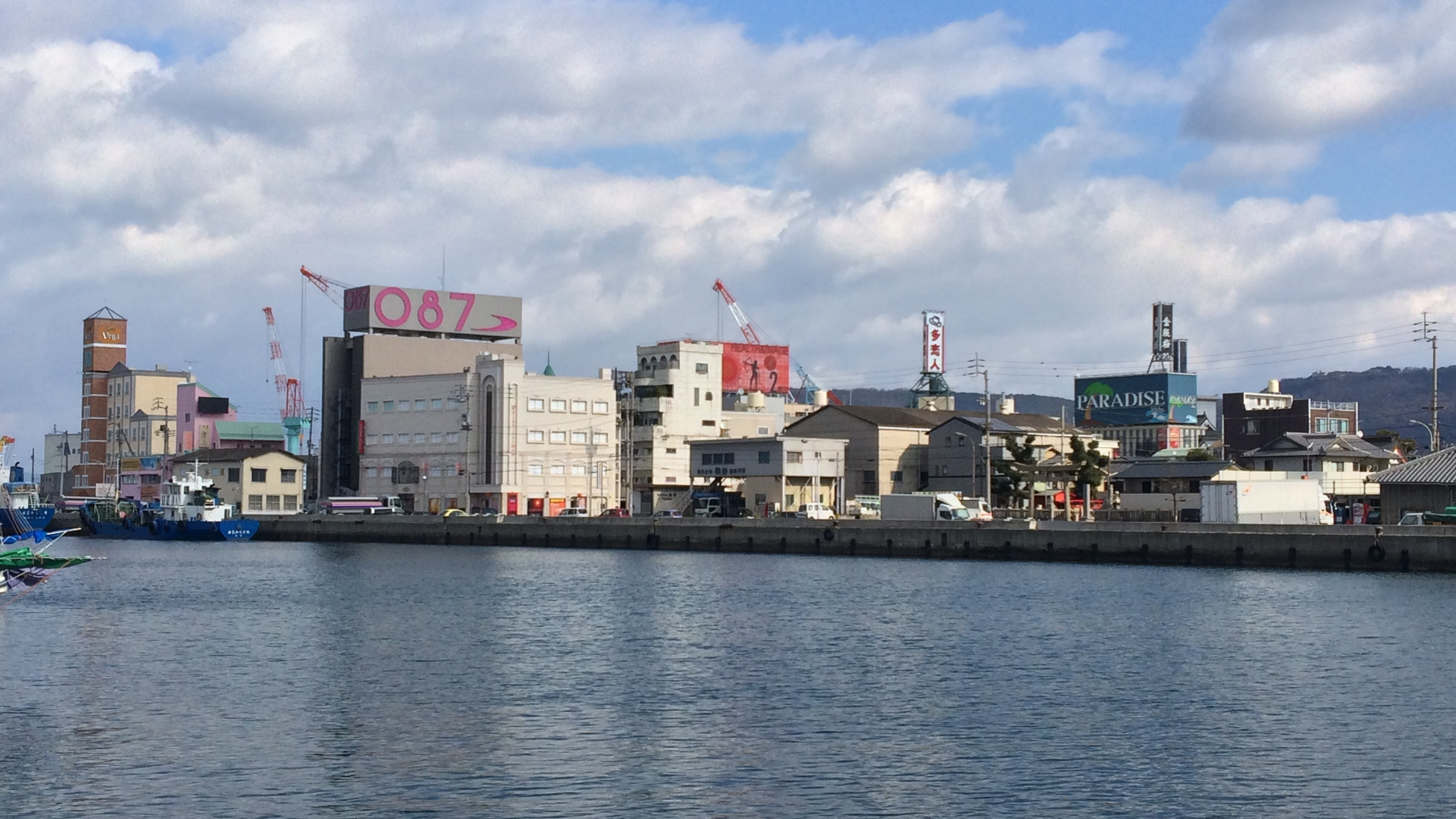 香川県高松市城東町二丁目の八重垣新地を西からみる。